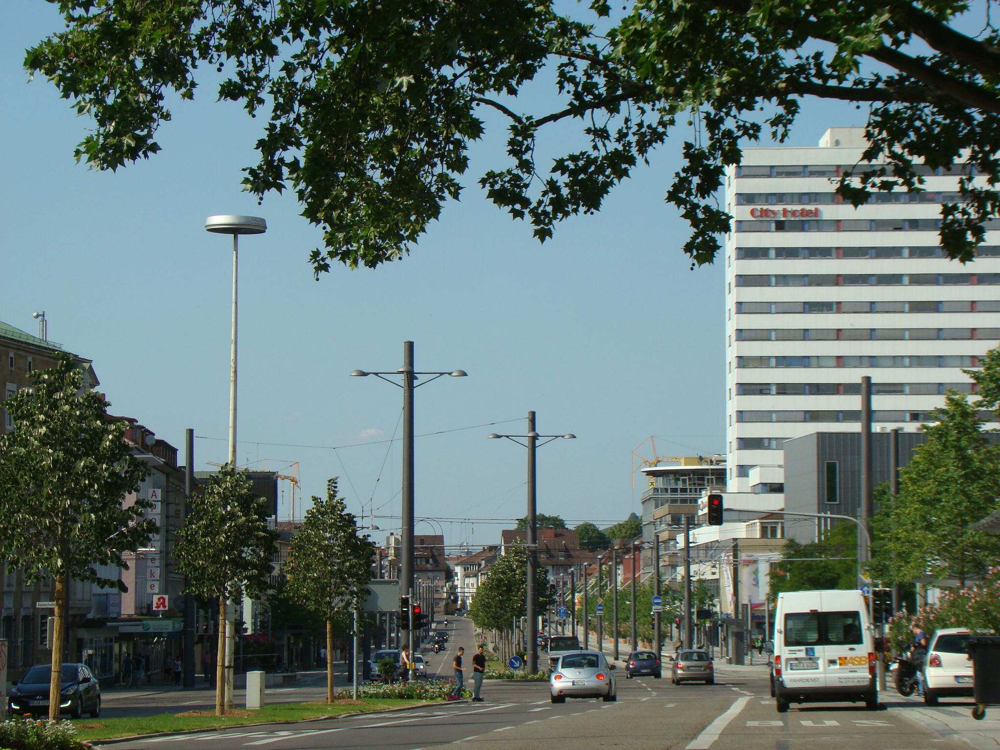 Allee in Heilbronn